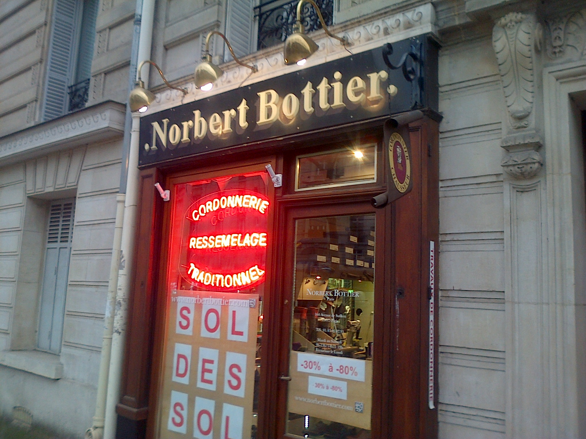 Enseigne d'un cordonnier (Norbert Bottier), 164 avenue de Suffren, 75015 Paris, France.